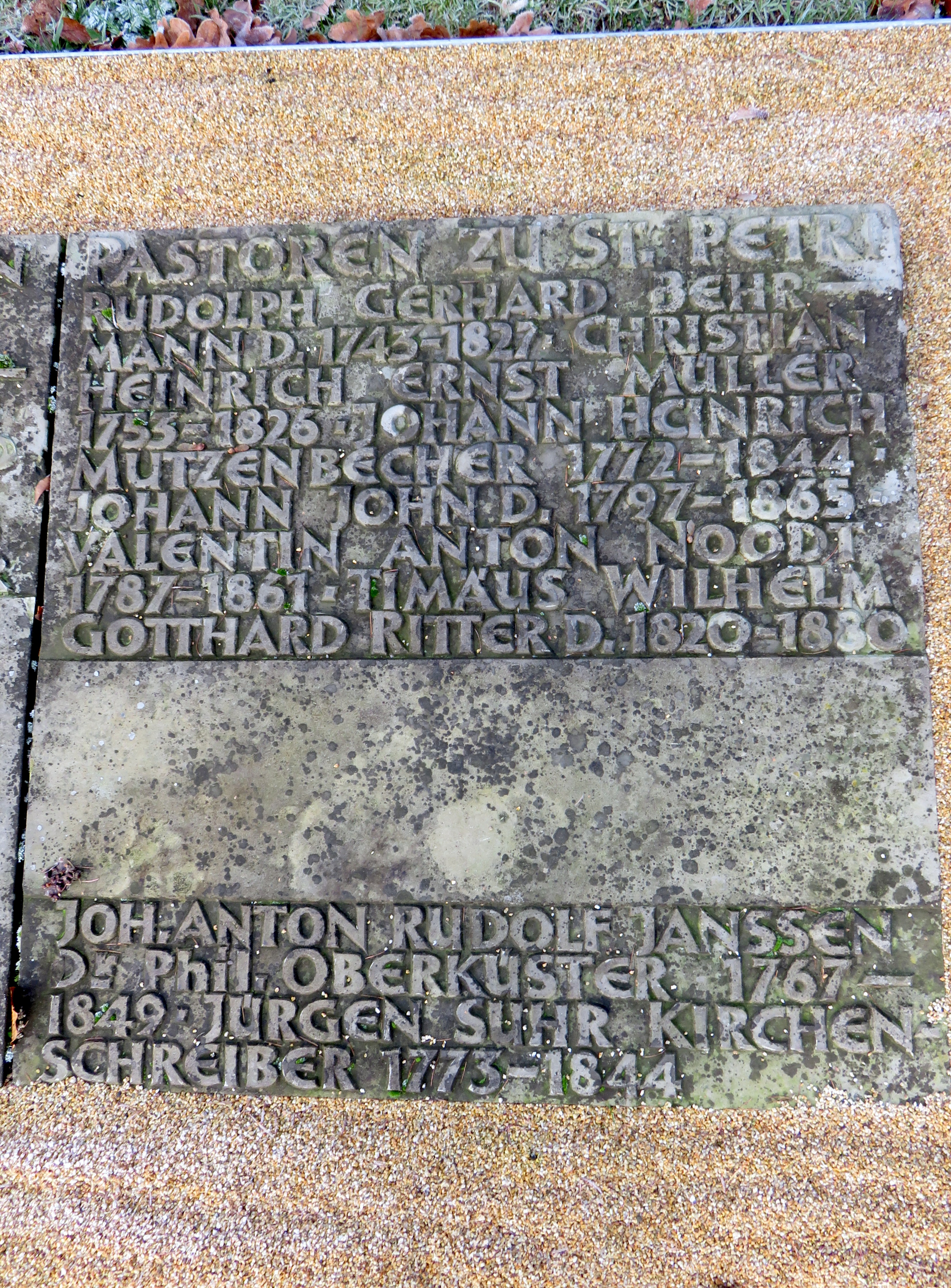 Doppelsammelgrab Hauptpastoren zu St. Petri / Pastoren zu St. Petri im Bereich des Althamburgischen Gedächtnisfriedhofs auf dem Hamburger Friedhof Ohlsdorf zu Ehren von unter anderen Johann Karl Wilhelm Alt, Adolf Kreusler, Johann John, Valentin Anton Noodt, Johann Anton Rudolph Janssen.